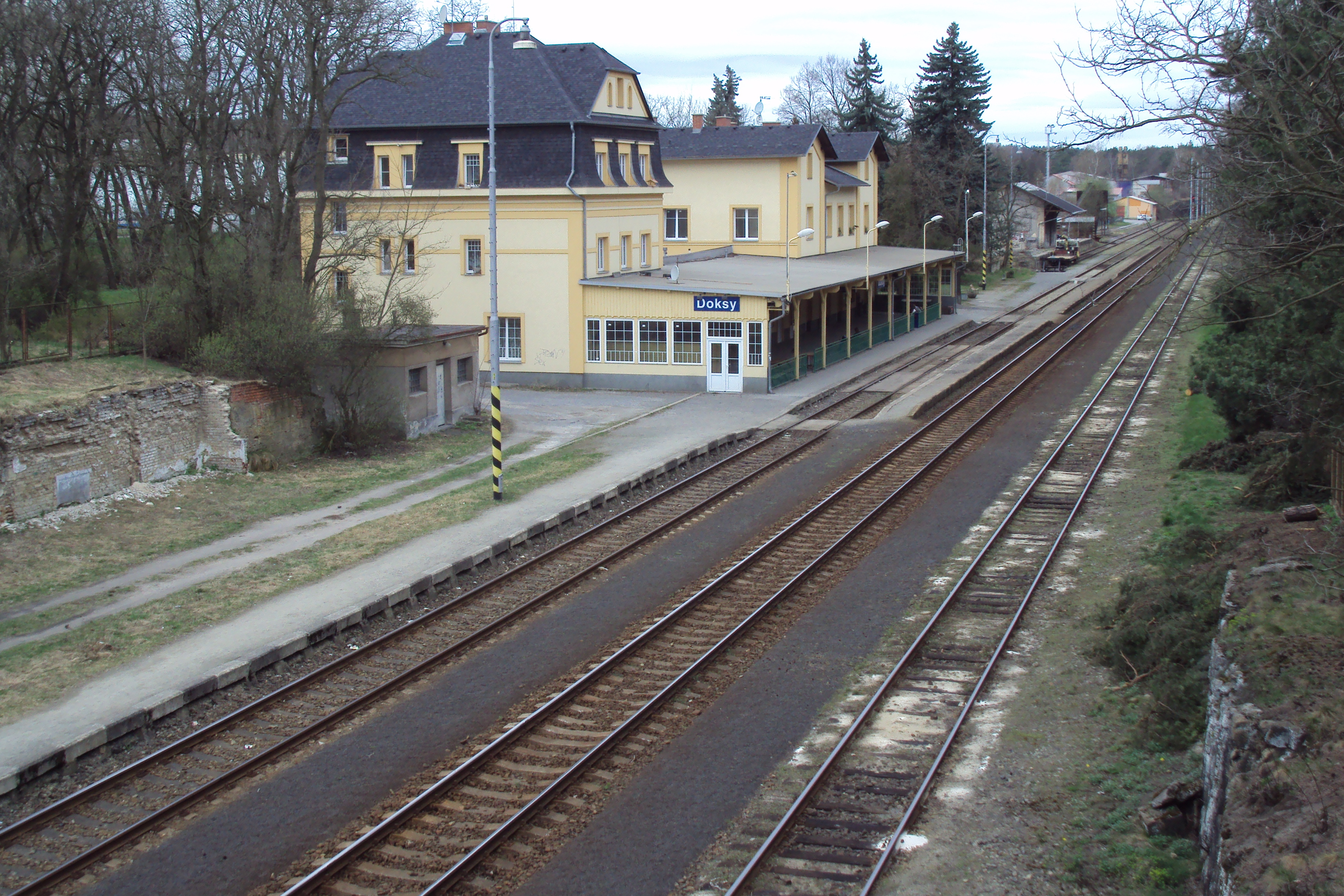 Nádraží z můstku k Máchovu jezeru